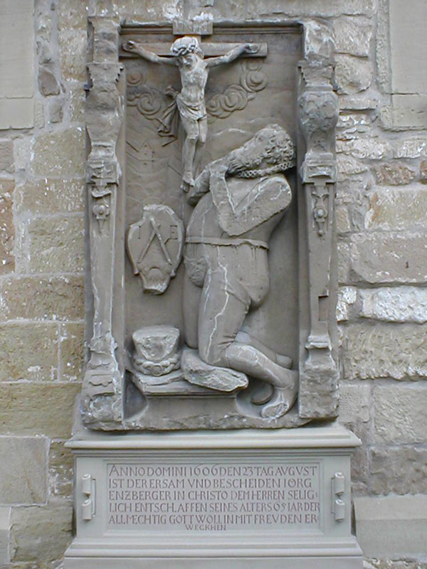 Epitaph für Herzogl. Hofmaier Jörg Enzberger von 1606 an der Martinskirche in Güglingen-Frauenzimmern